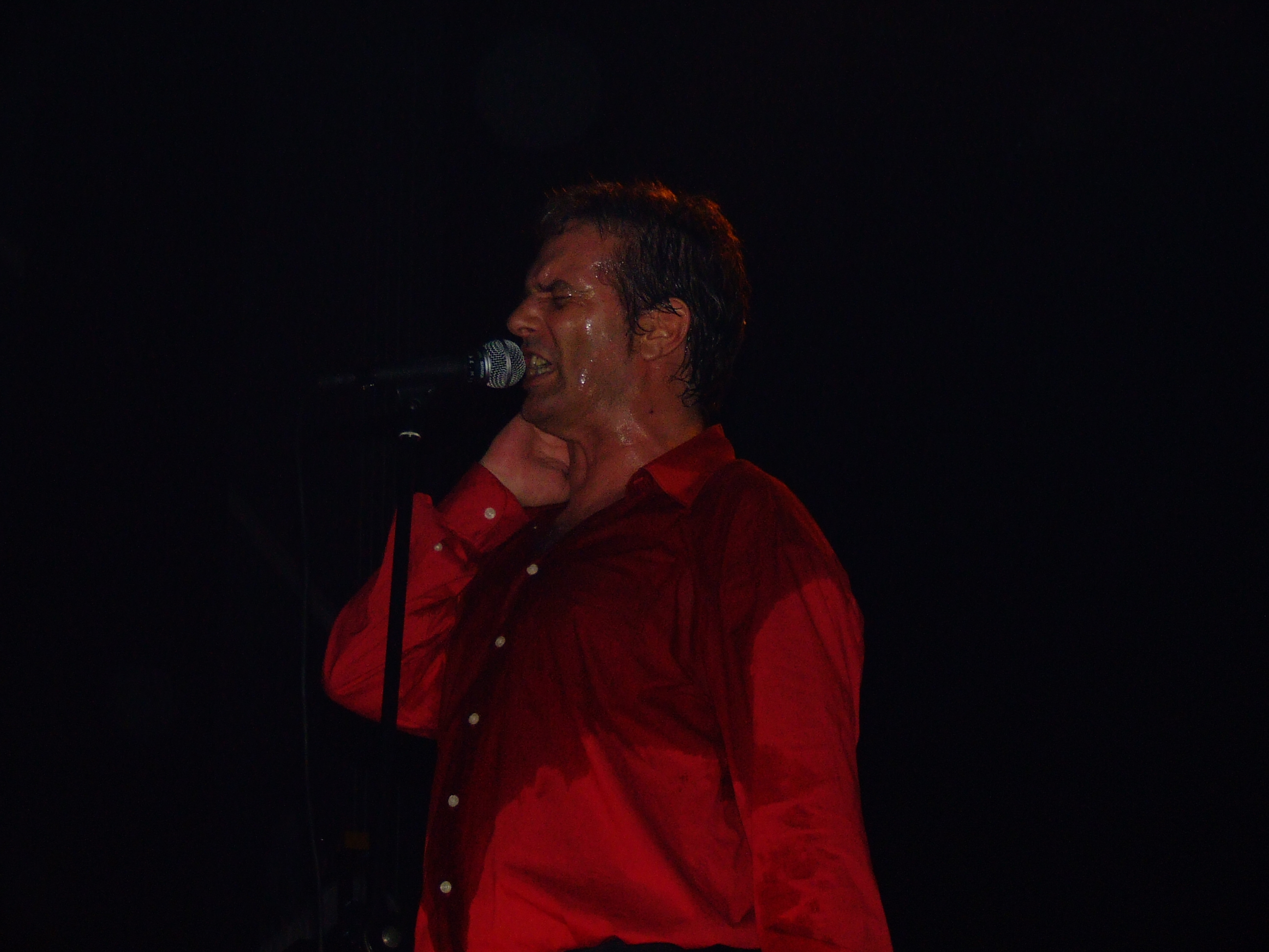 Adolfo Luxuria canibal, vocalista dos Mão Morta no SÃO MAMEDE Centro de Artes e Espectáculos de Guimarães.